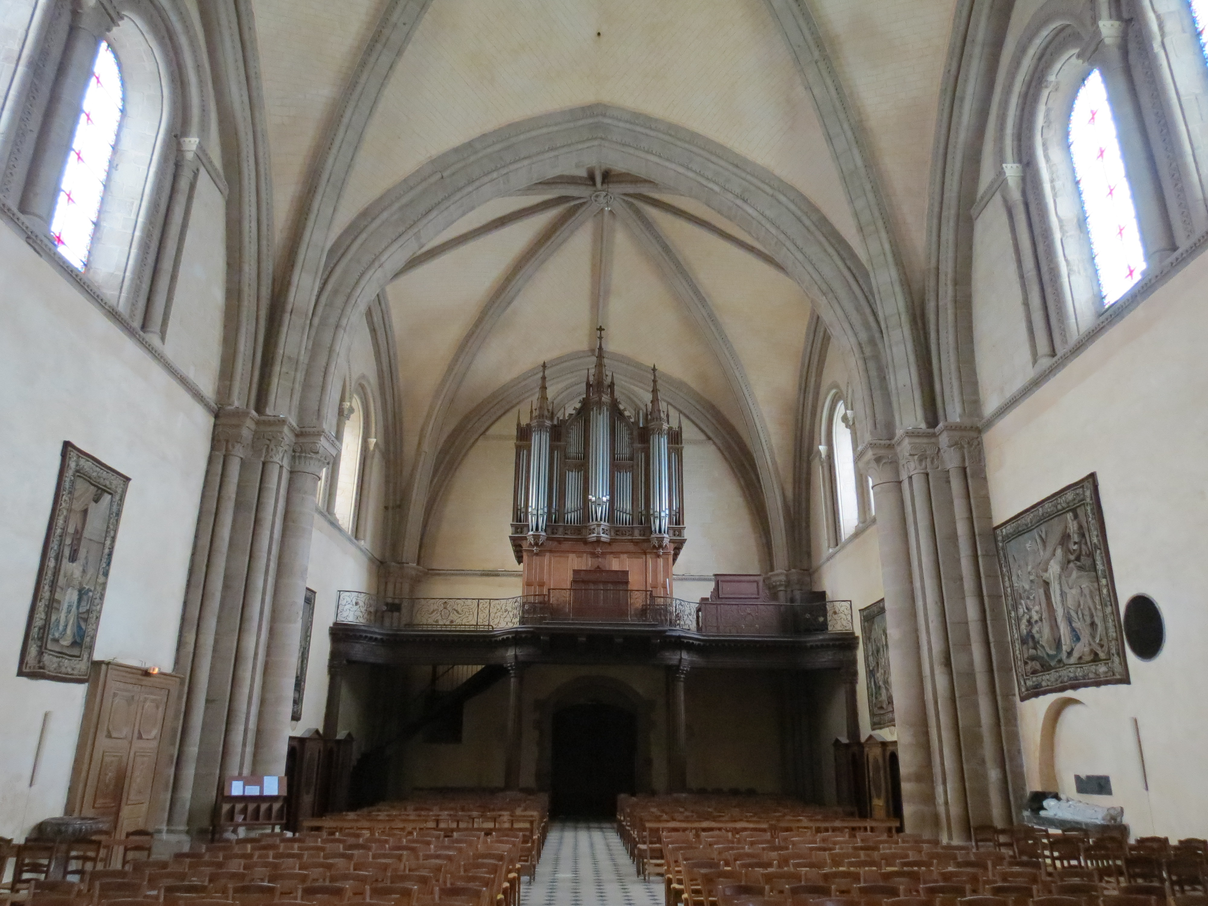 Laval (Mayenne, Pays de la Loire, France) cathédrale de la Sainte-Trinité, orgue d'Aristide Cavaillé-Coll de 1853, restauré par Jean Renaud en 1976.